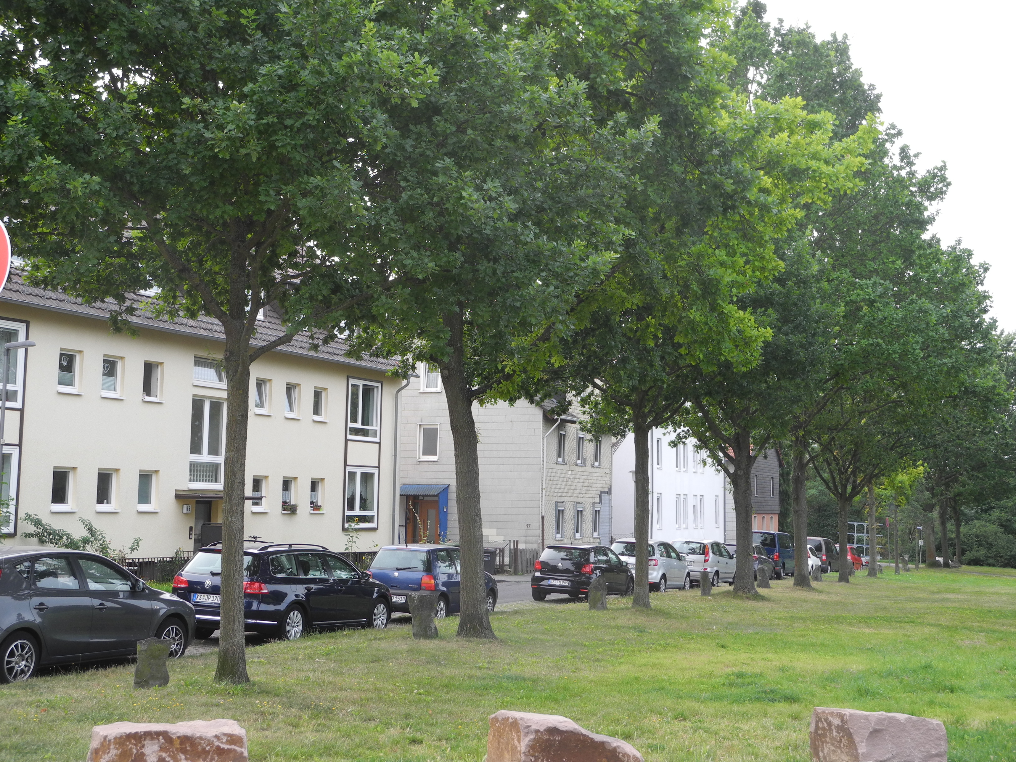 7000 Eichen – Stadtverwaldung statt Stadtverwaltung, eine soziale Plastik von Joseph Beuys, gestartet 1982 auf der documenta 7 in Kassel, Hessen, Deutschland.Standort: Wahlershäuser Straße, Ostrand der Grünfläche an der Kirchditmolder StraßeArt: Stieleiche Quercus roburPflanzjahr: ab 1982 mit einigen späteren Nachpflanzungen